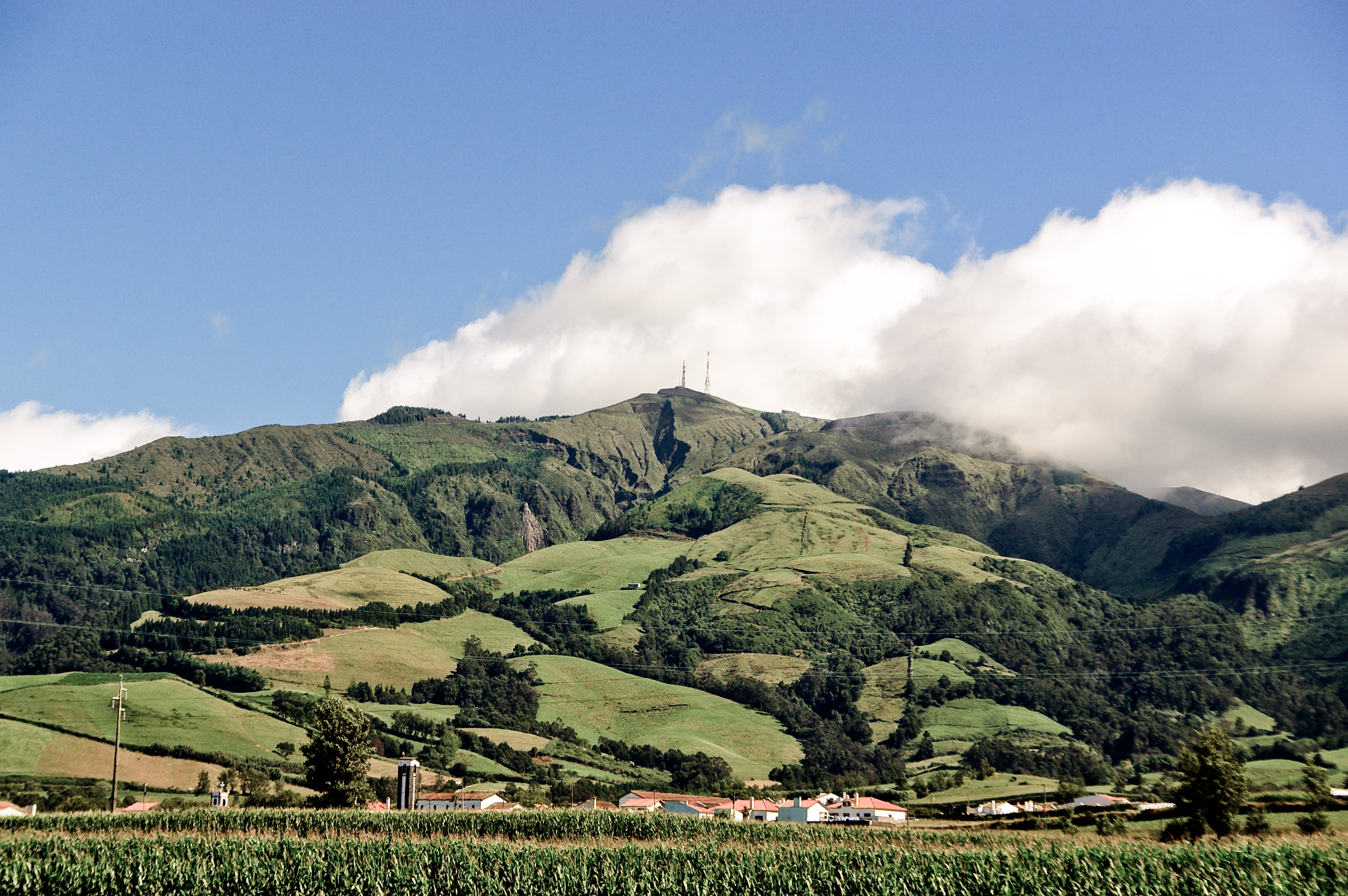 Azores, Portugal.